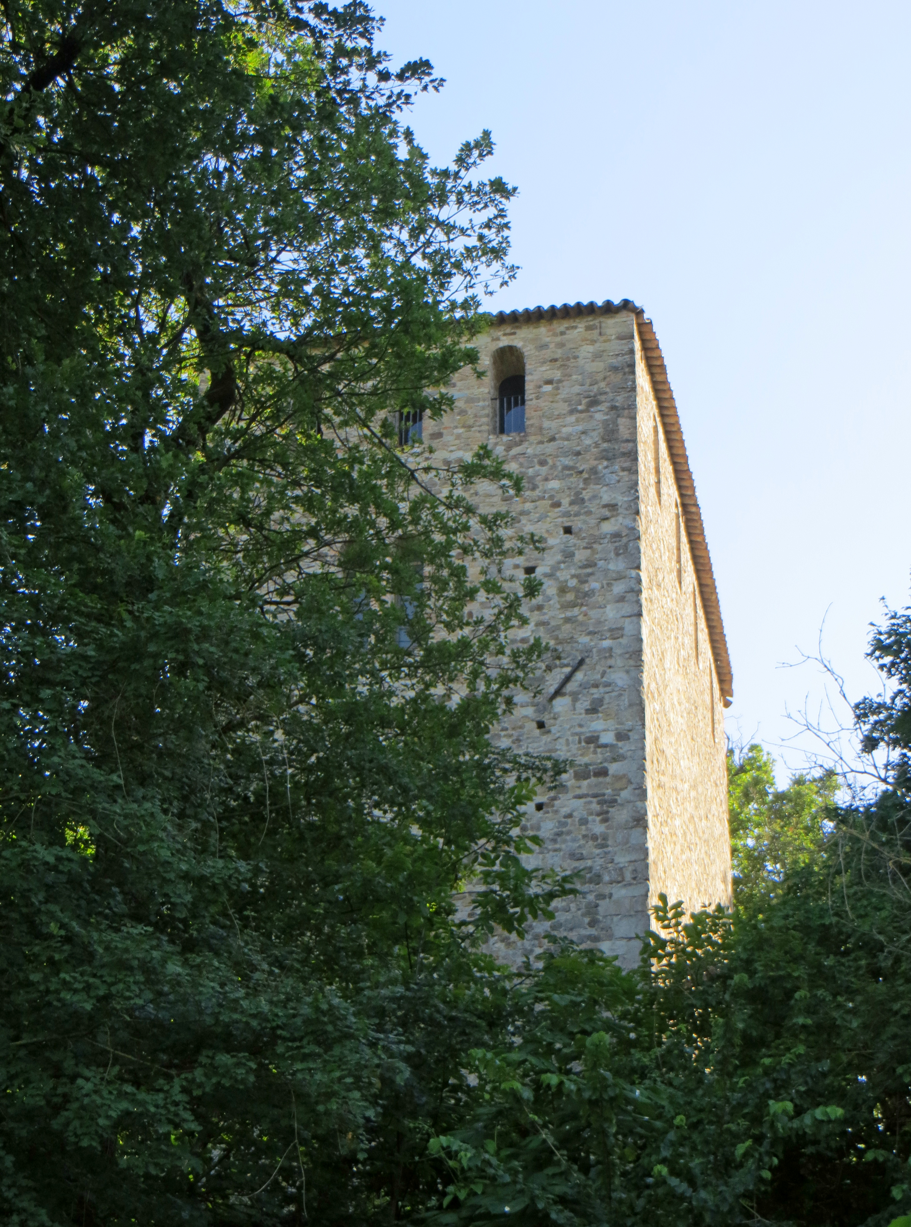 Castello di Guardasone (Traversetolo) - mastio